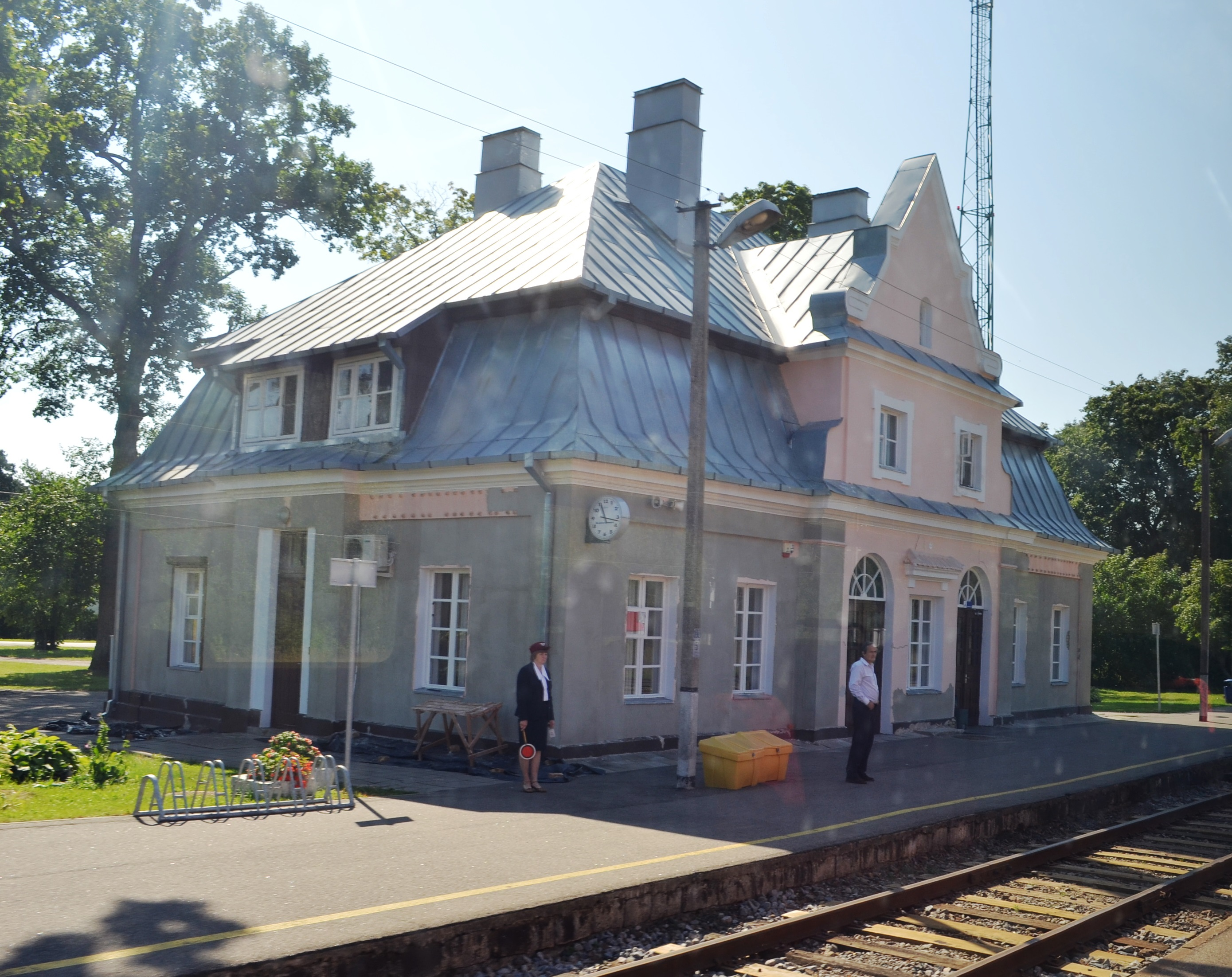 Naujieji Valkininkai, Varėnos raj. Geležinkelio stotis